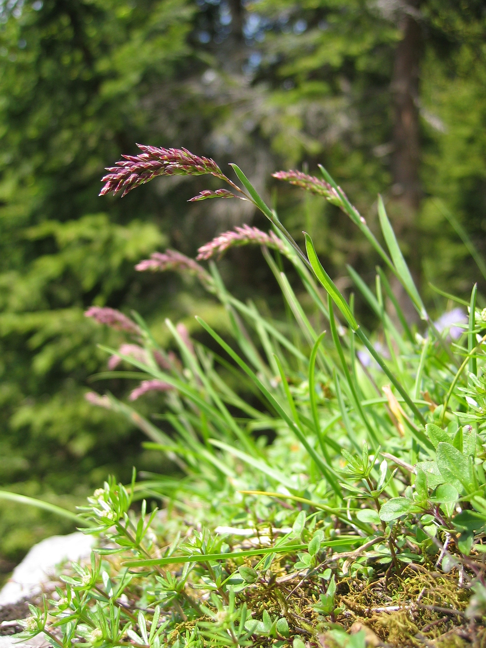 Poa alpina, Hintereggeralm ~ 1300 m, Styria, Austria